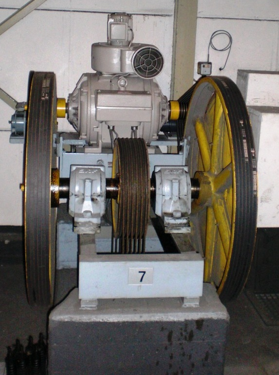 Maschine mit Keilriemengetriebe, Bj.1980